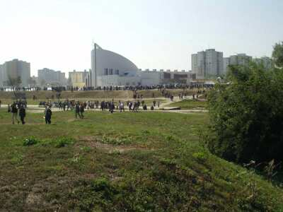 Moja fotka mosta cez Kanal pri kostole na Markovej...